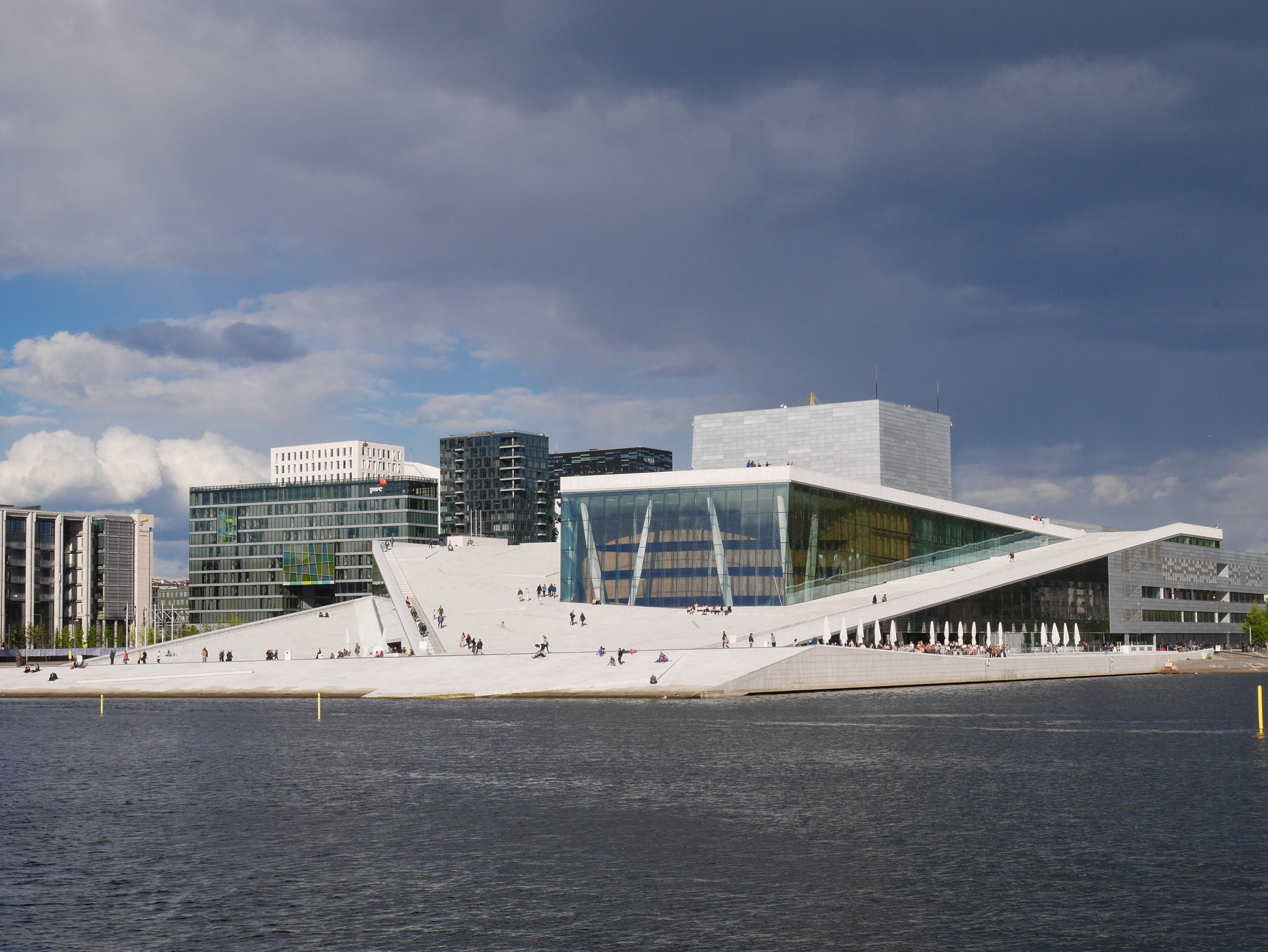 Oslo Opera Oper